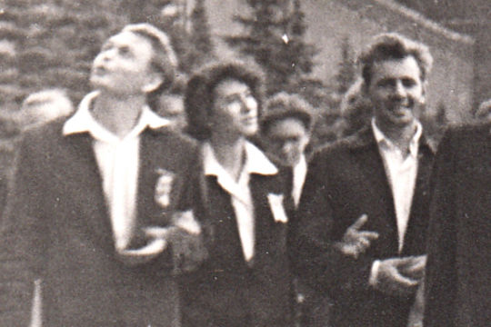 Inna Želeněcová s přáteli na Rudém náměstí, festival v Moskvě, 1957